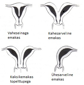 Emaka väärarengud